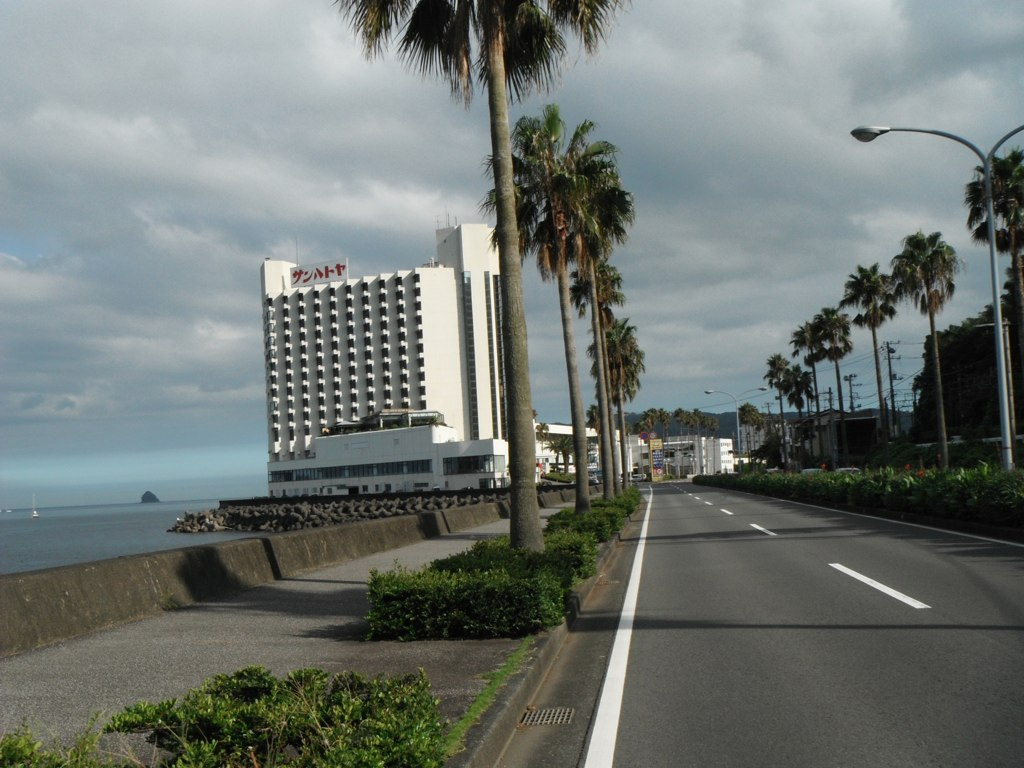 CM で有名なサンハトヤ